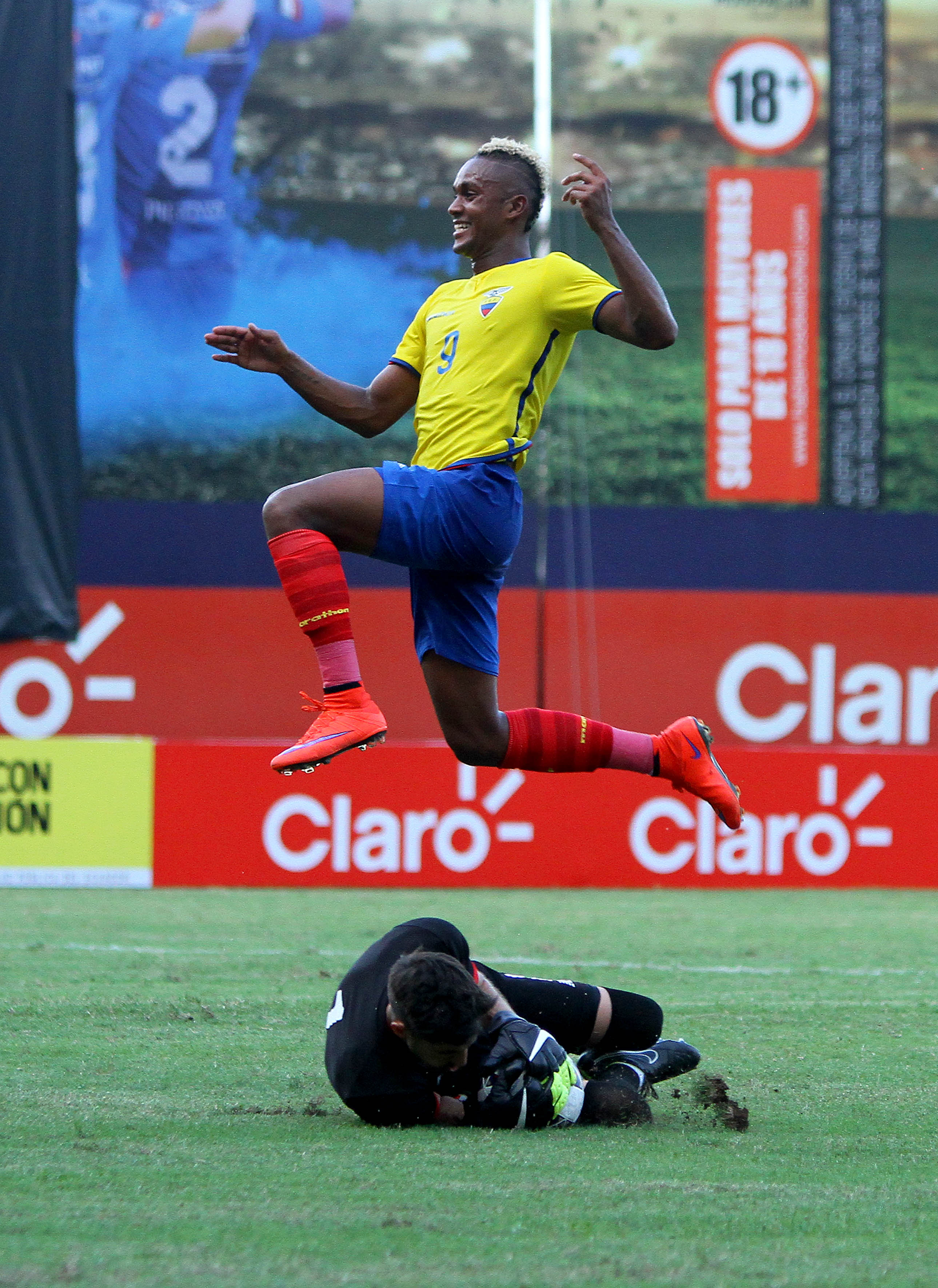 Guayaquil, 06 de jun (Andes).-En el estadio George Capwell, la selección de fútbol de Ecuador se enfrenta a Panamá en partido amistoso Foto: César Muñoz/Andes